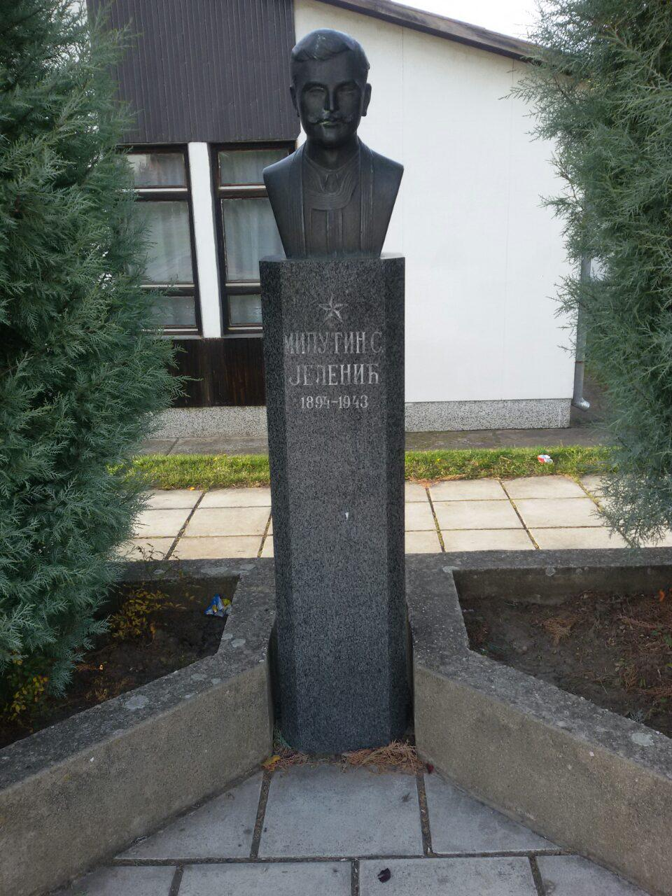 Улаз у школу краси биста Милутина Јеленића